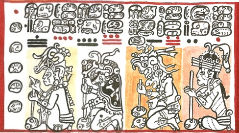 detalle del Códice de Dresden mostrando un almanaque del Tzolk´in